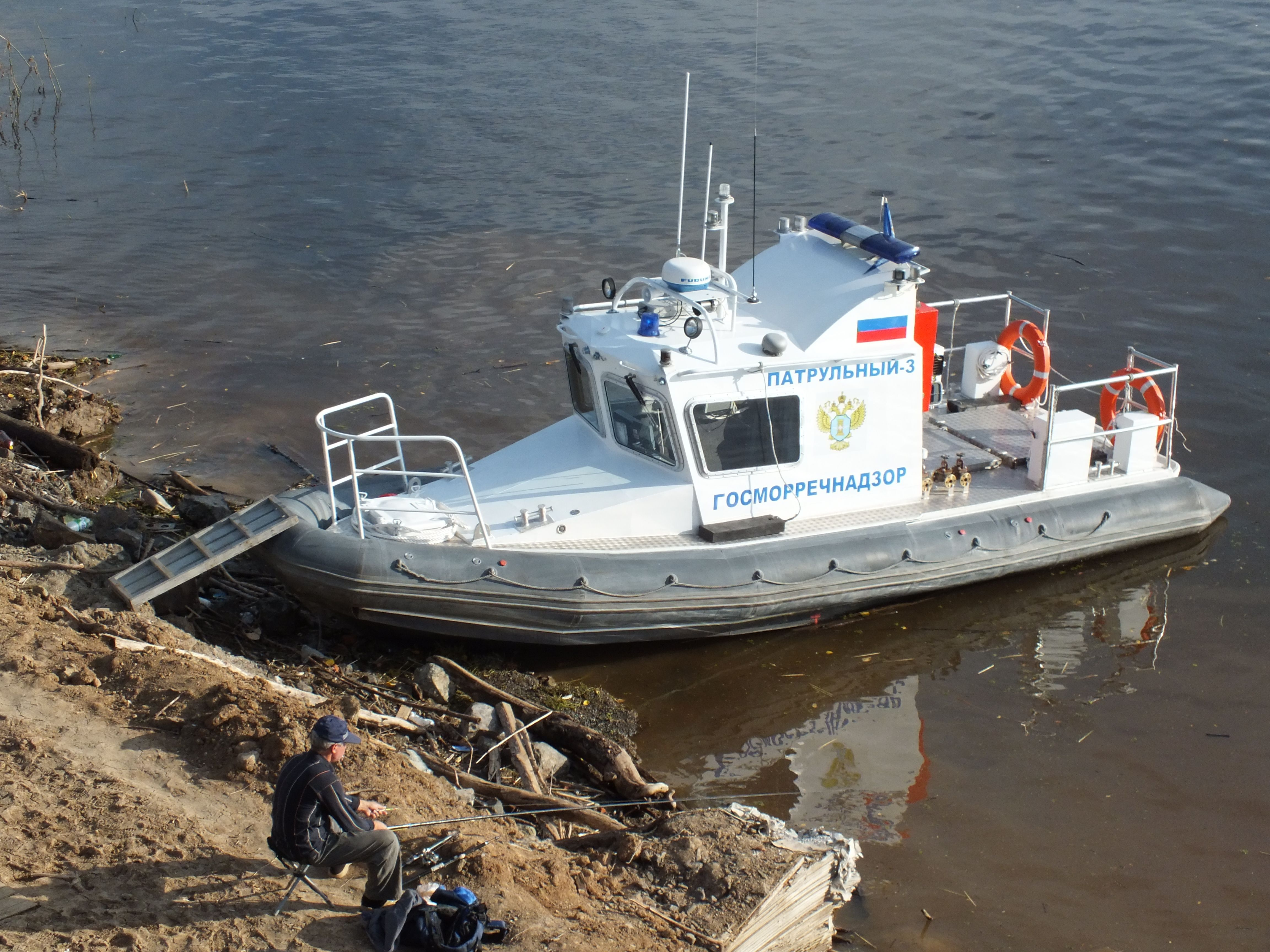 Катер Патрульный-3